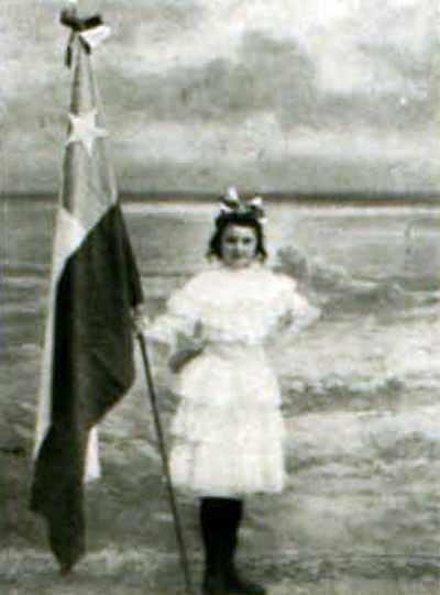 La hija de la familia Baehcker sosteniendo la bandera chilena de seda que supuestamente ganó un certamen internacional de Blankenberghe en 1907.